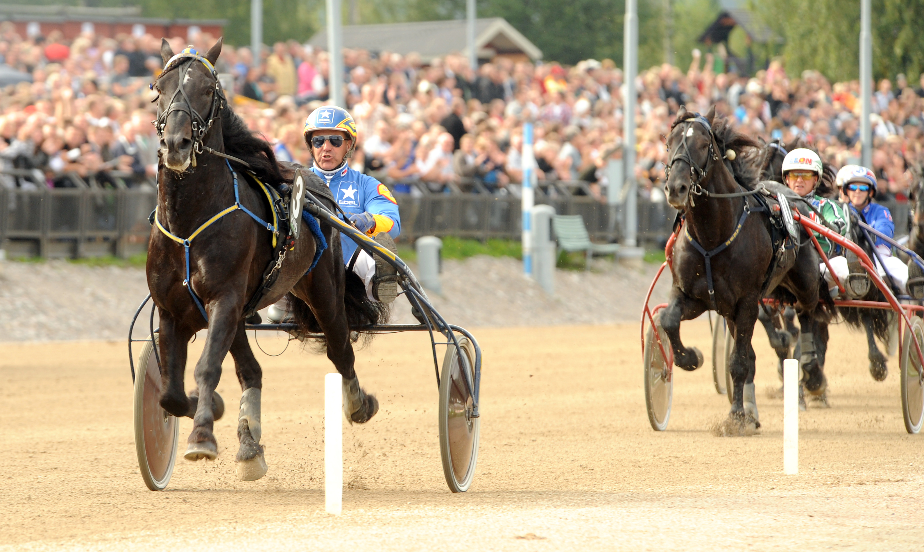 Järvsöfaks med kusken Jan-Olov Persson vinner SM för kallblod 2009.